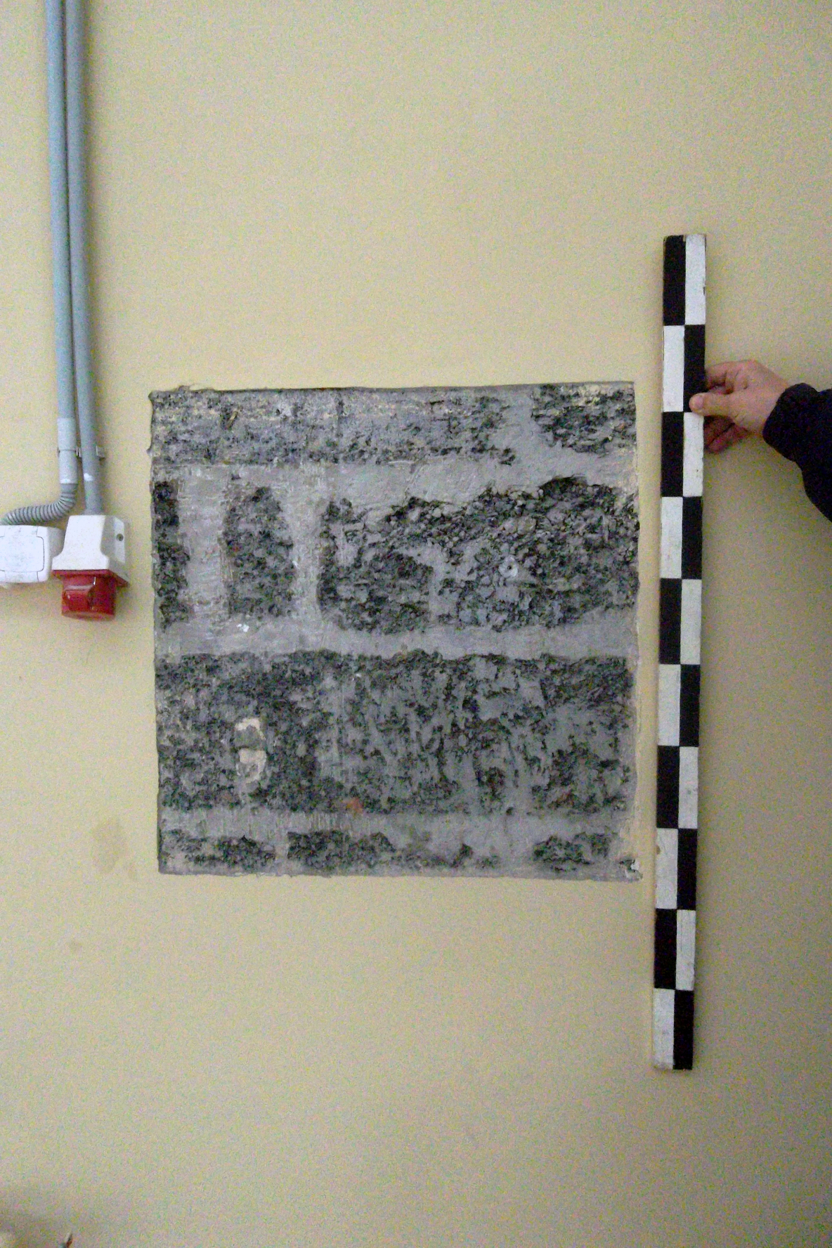 Шлакобетонные стены Эрмитажного Гаража, построенного в 1911 году по проекту архитектора Н.И.Крамского в Западине Черного проезда Зимнего Дворца. Возобновлён в 2011 году архитектором В. В. Ефимовым.